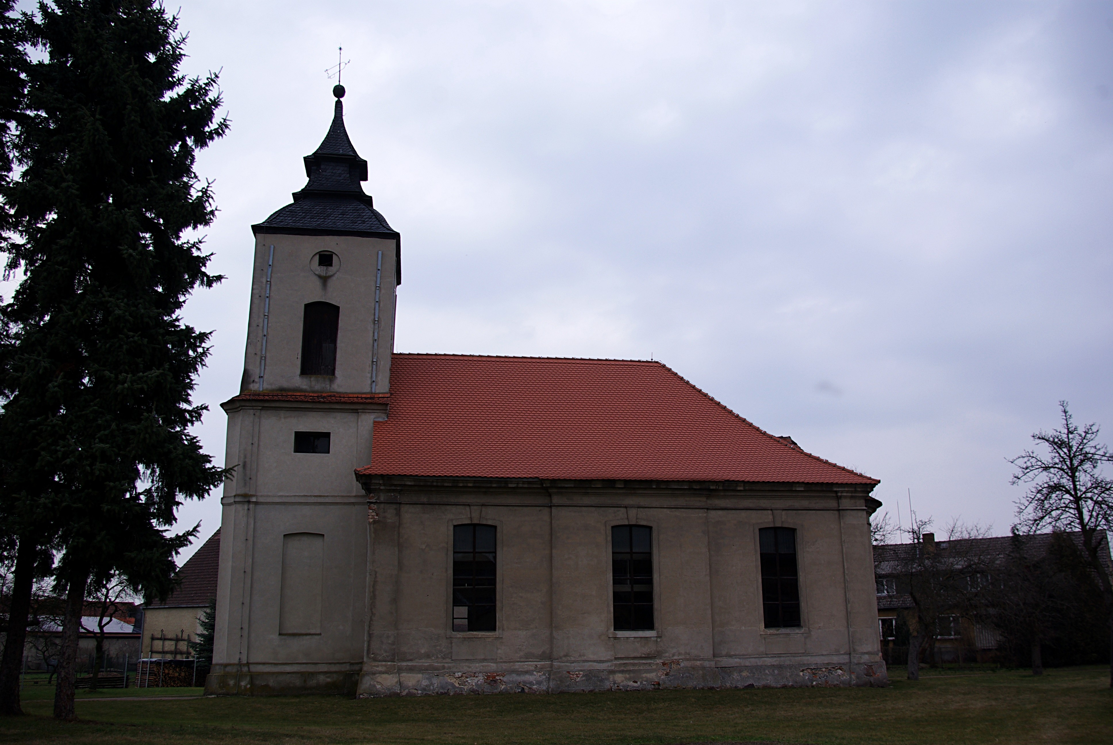 Wollin (Fläming), in Brandenburg. Die Kirche in Wollin ist denkmalgeschützt. Das Baujahr der Kirche ist 1751 (geotags in den exif-daten).